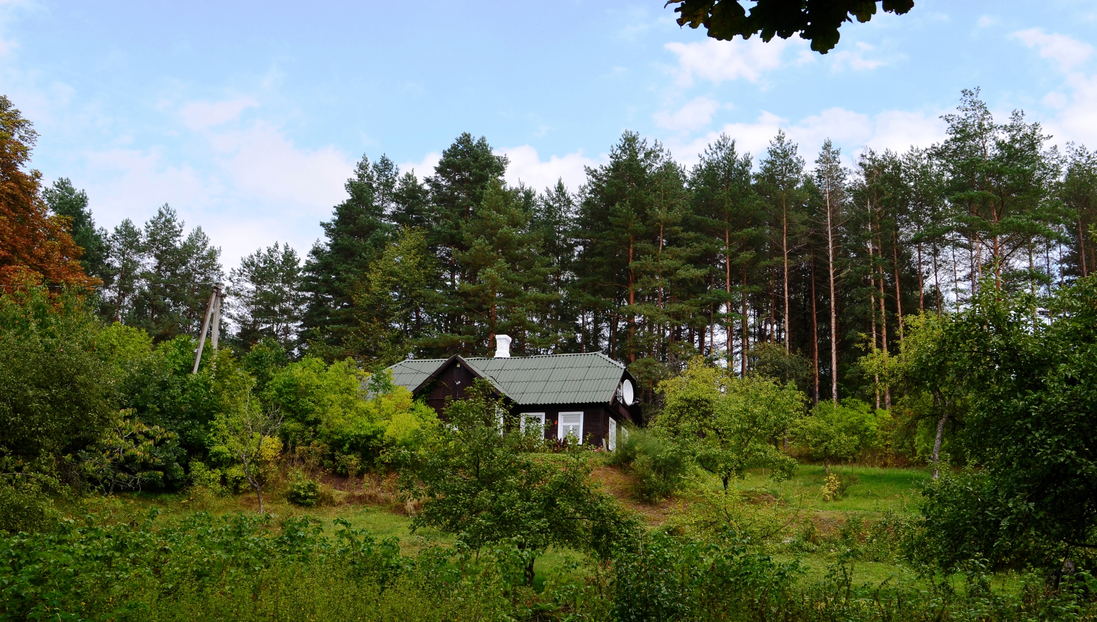 Iškartos, Sapieginė, Vilnius